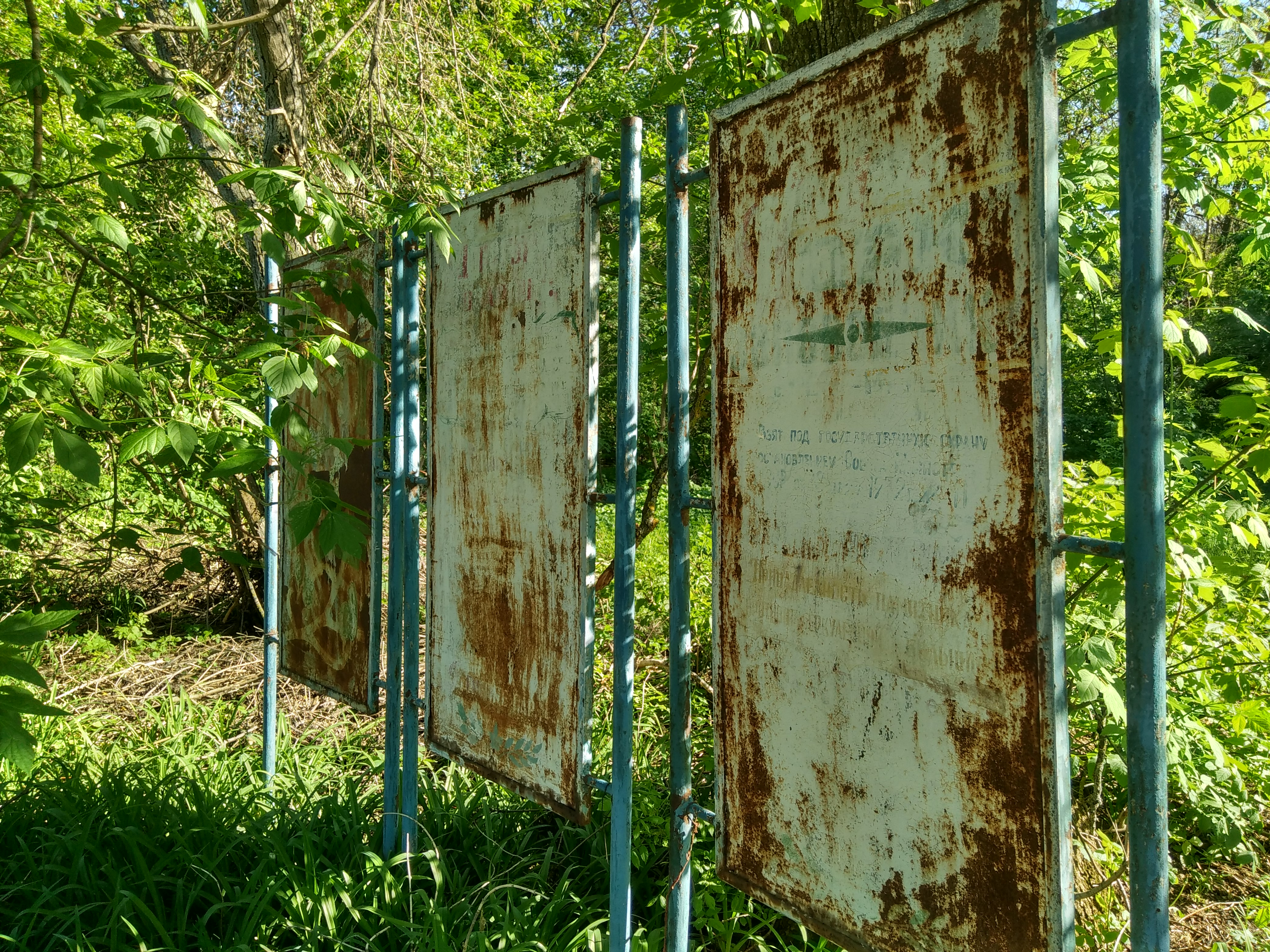 Parcul din satul Rediul Mare, monument al naturii amplasat în raionul Dondușeni, satul Rediul Mare (cod MD-DN-map-009)